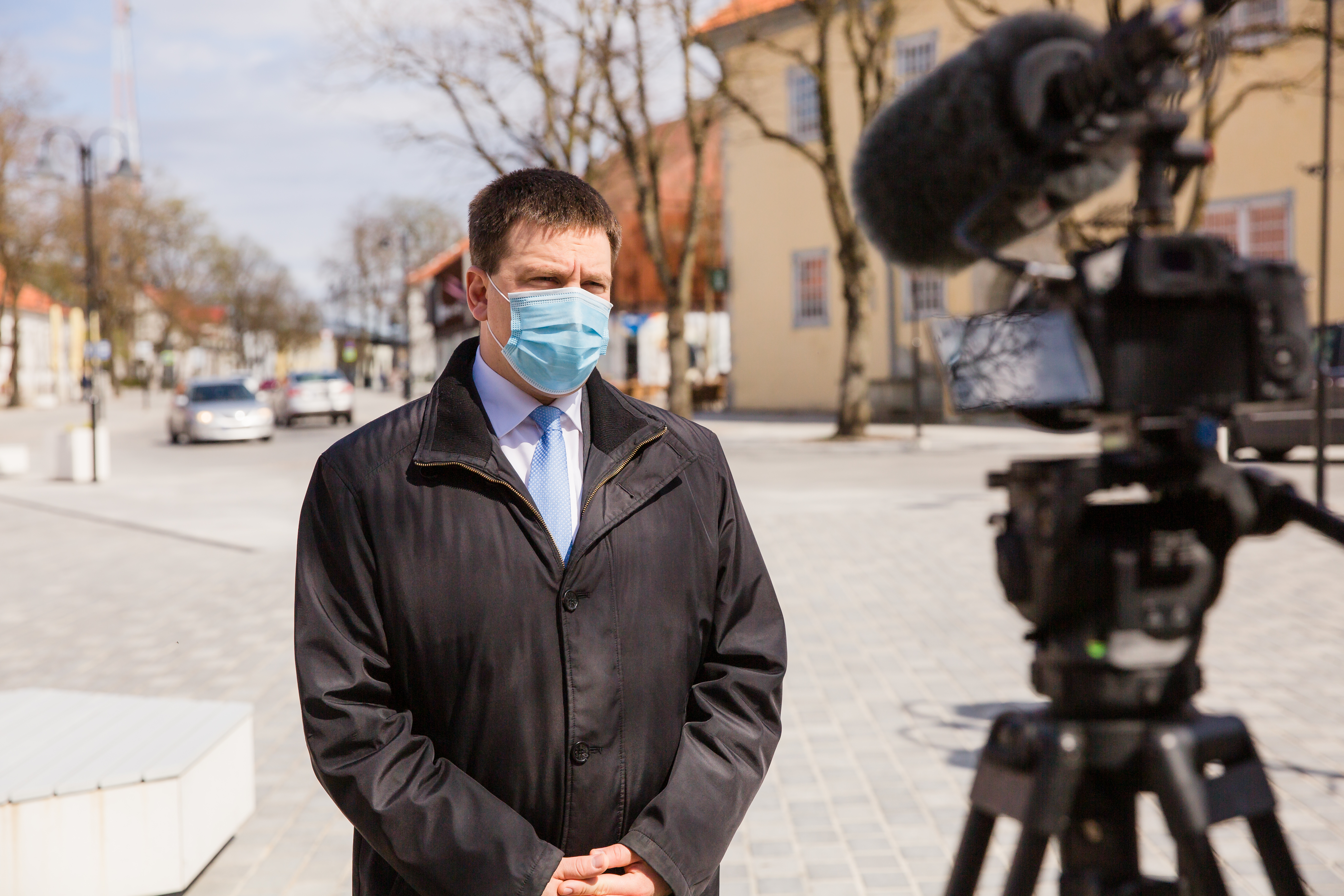 Jüri Ratase Muhu- ja Saaremaa visiit mais 2020.